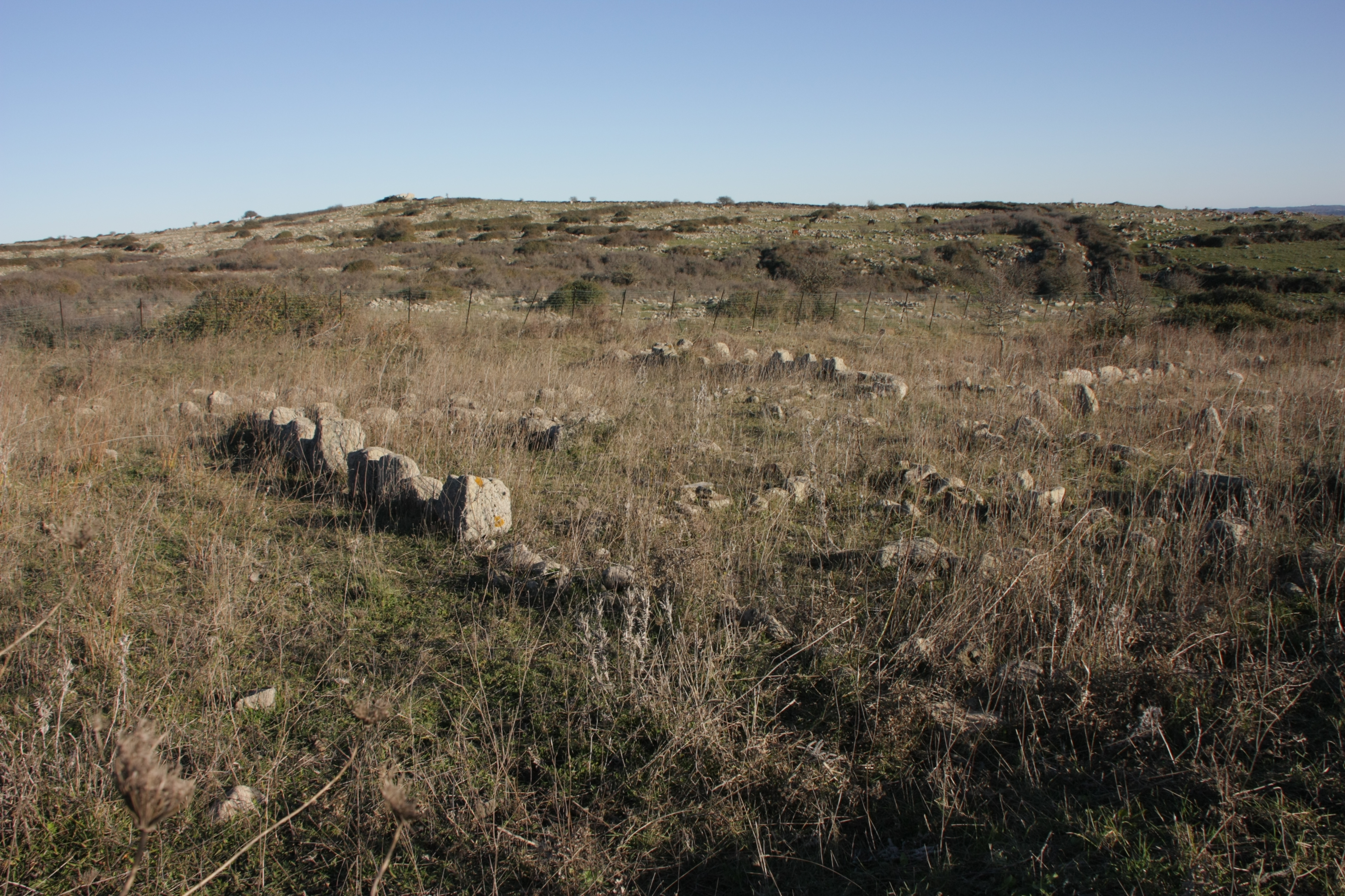 Casmene